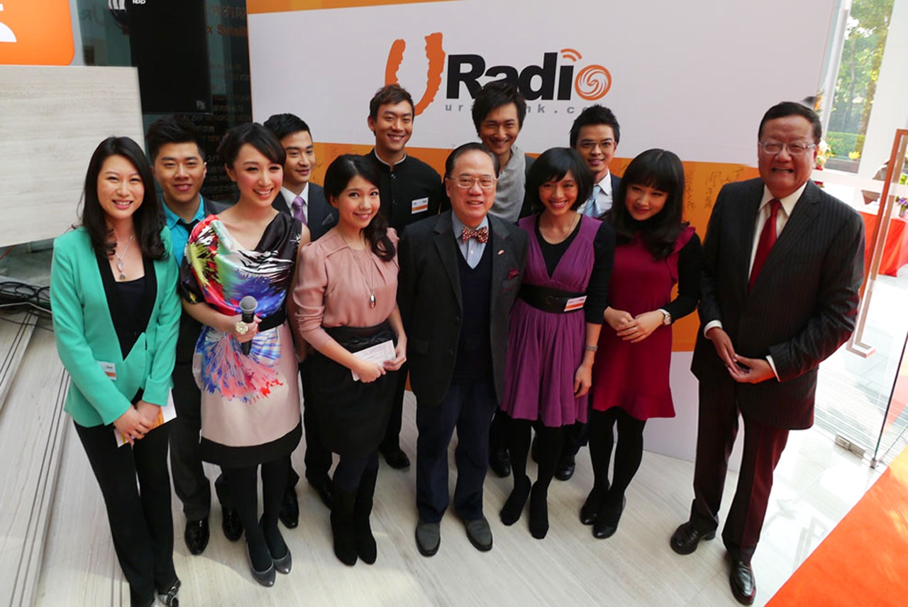 粵語: Uradio